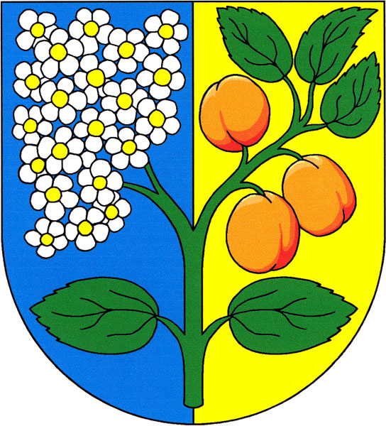 Znak obce Prackovice nad Labem